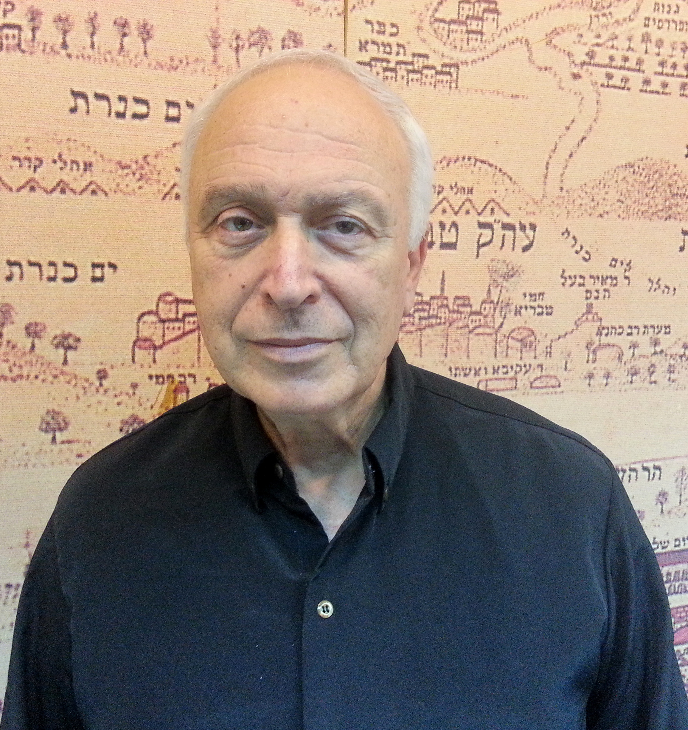 יוסף (יוסי) קיסטר